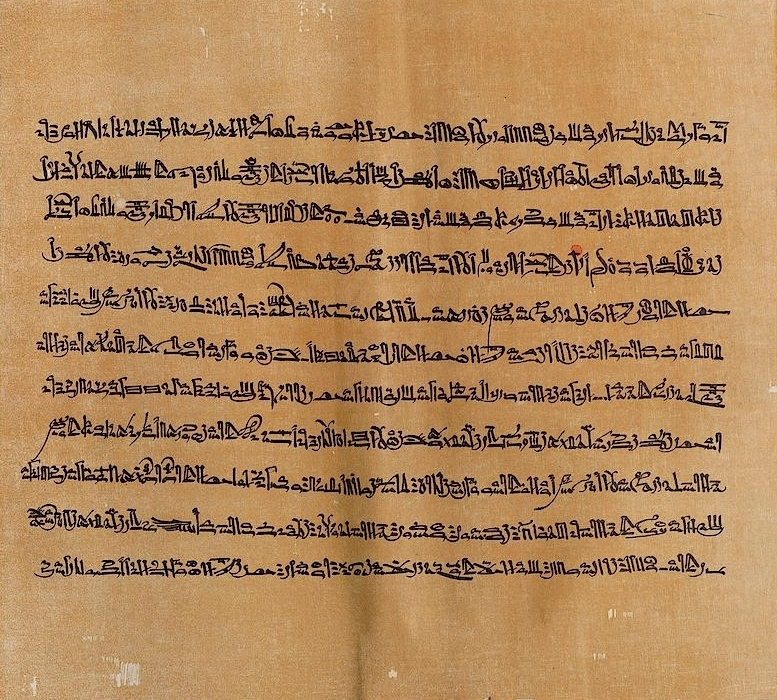 Tafel 76 des Papyrus Harris I, Britisches Museum, London